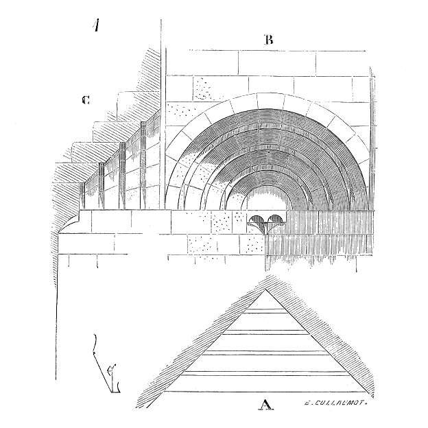 ... Les trompes sont appareillées, soit au moyen d'une suite d'arcs concentriques, soit en forme de cône. La figure 1 donne une trompe composée d'arcs concentriques biseautés à 45 degrés, de manière à pénétrer les côtés du carré. En A est tracée la projection horizontale d'une de ces trompes, en B son élévation, en C sa coupe. Ces sortes de trompes sont les plus anciennes, on en trouve dans les monuments du XIe siècle ...